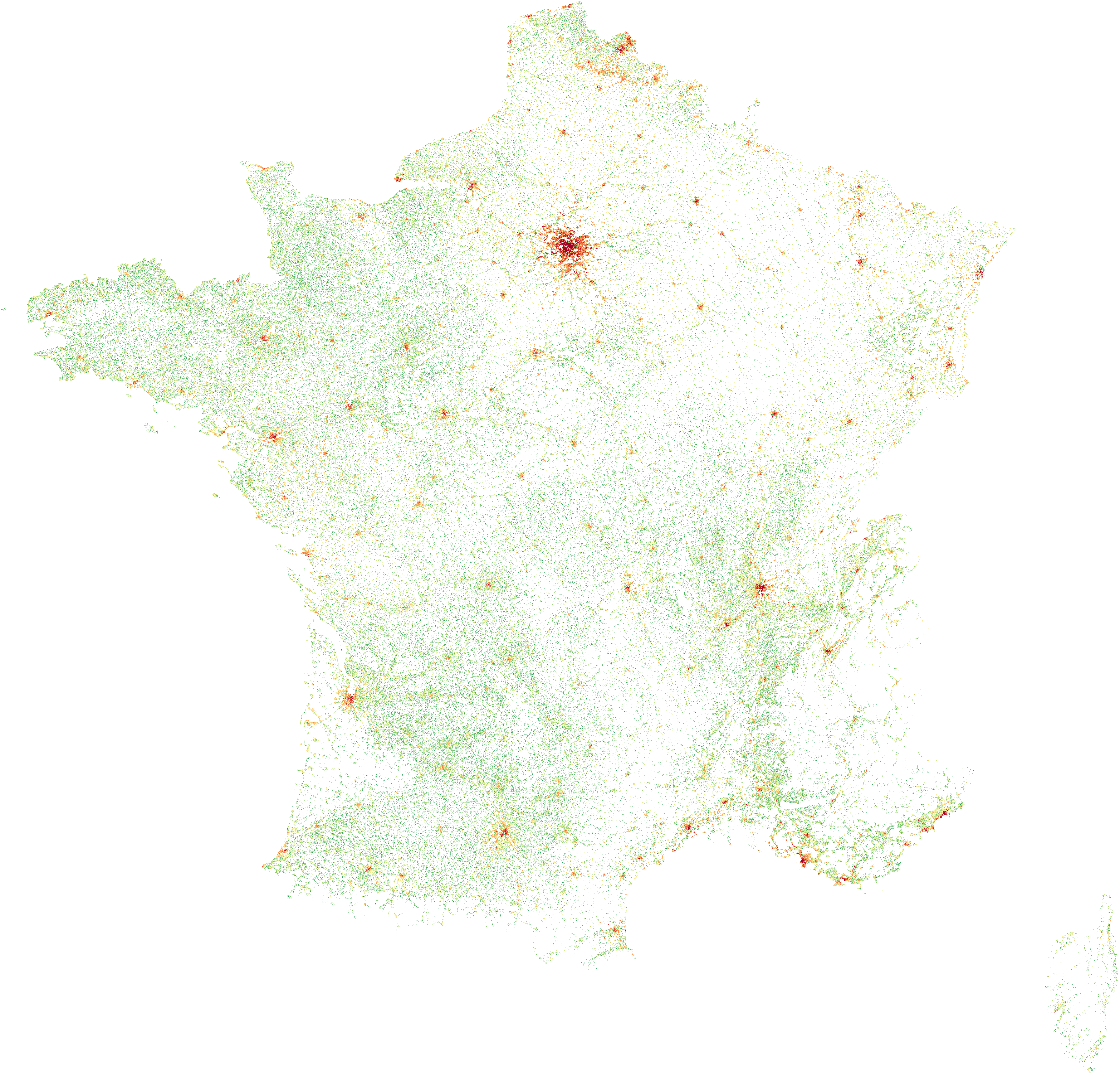 English (en): Density population of France, on a 200 m by 200 m square grid. (WGS84 projection.) Color is relative to the number of inhabitants per square: None (0 people/km²) 1 to 4 (25 to 100 people/km²) 5 to 9 (125 to 225 people/km²) 10 to 19 (250 to 475 people/km²) 20 to 49 (500 to 1,225 people/km²) 50 to 99 (1,250 to 2,475 people/km²) 100 to 249 (2,500 to 6,225 people/km²) 250 to 499 (6,250 to 12,475 people/km²) 500 to 999 (12,500 to 24,975 people/km²) 1,000 or more (25,000 people/km² or more)